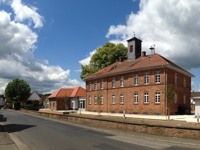 Das Mehrgenerationenhaus in Bleichenbach, einem Stadtteil von Ortenberg im Wetteraukreis, Deutschland